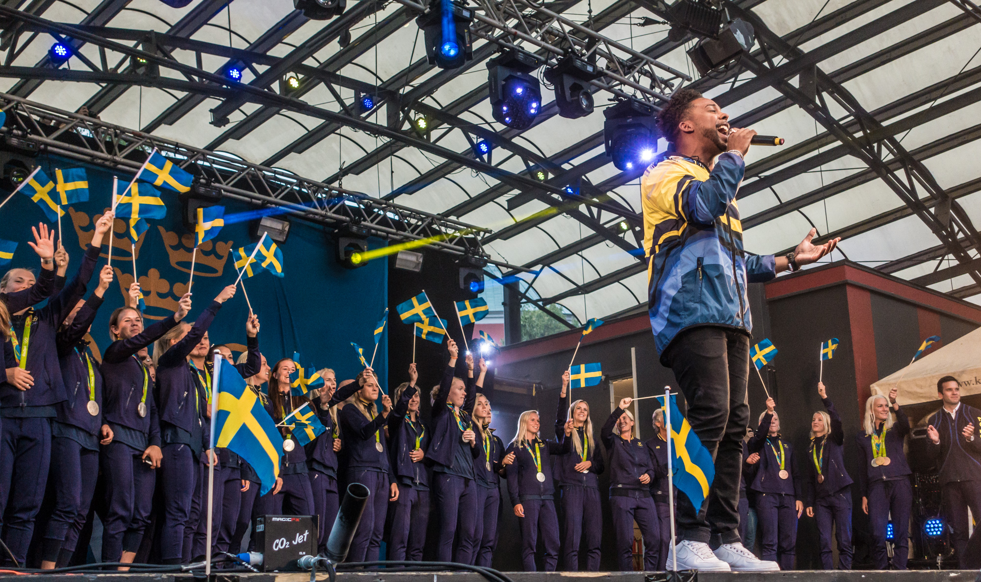 OS-medaljörerna 2016 hyllas i Kungsträdgården den 21 augusti 2016. Samtliga svenska medaljörer var på plats, förutom damernas fotbollslandslag, Henrik Stenson (silver, golf), Emma Johansson (silver, cykel) och Jenny Rissveds (guld, mountainbike).